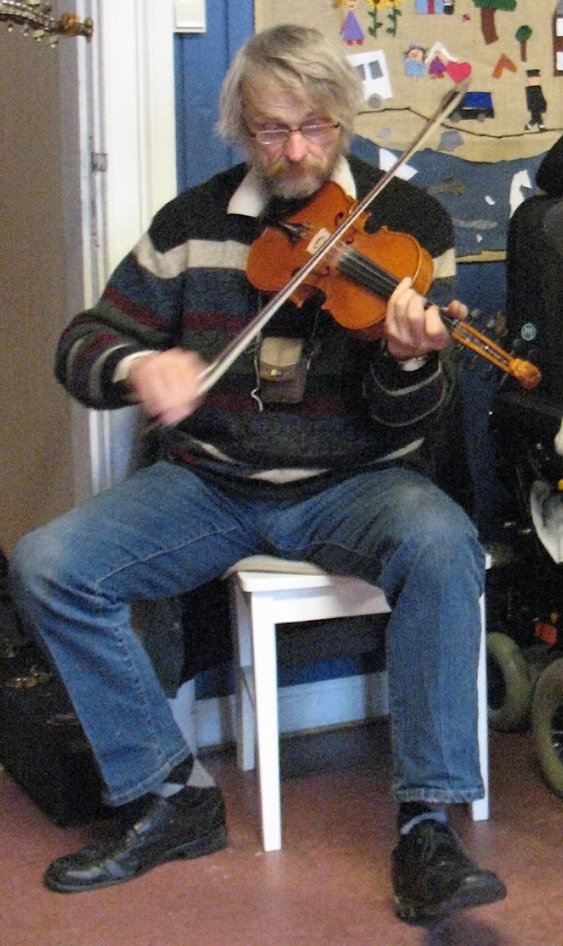 Vidar Lande speler med Byglandsspelemennene på treff på Frivilligsentralen på Bygland.